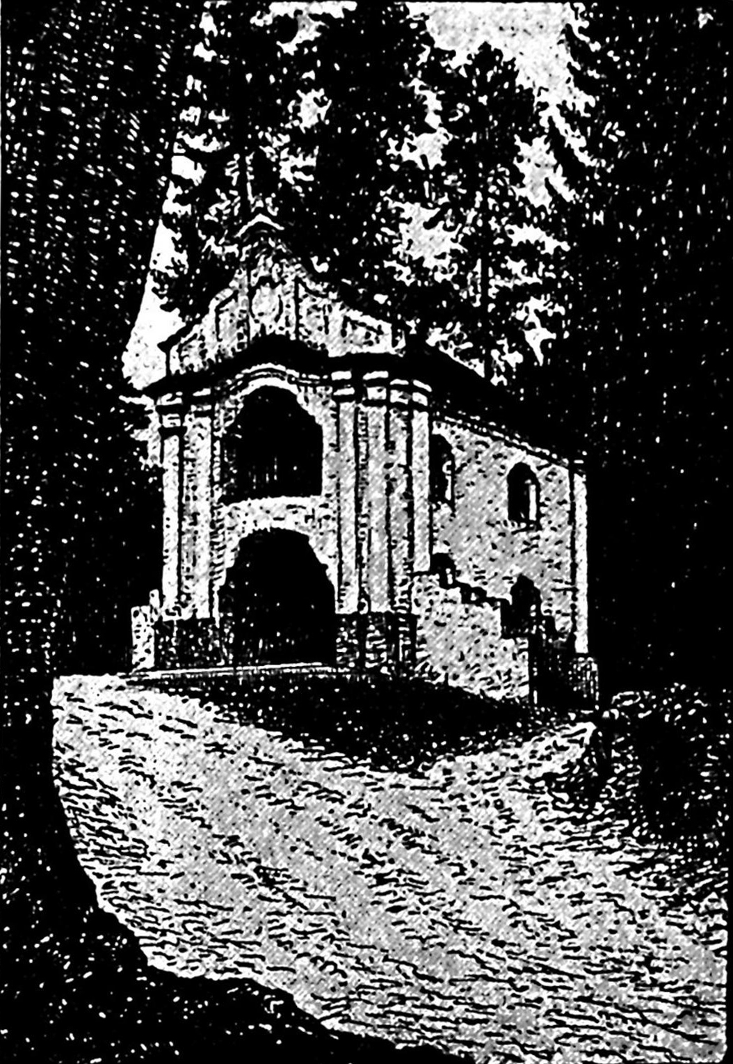 Беларуская (тарашкевіца): Вільня (Vilnia), Кальварыя (Kalvaryja). Капліца